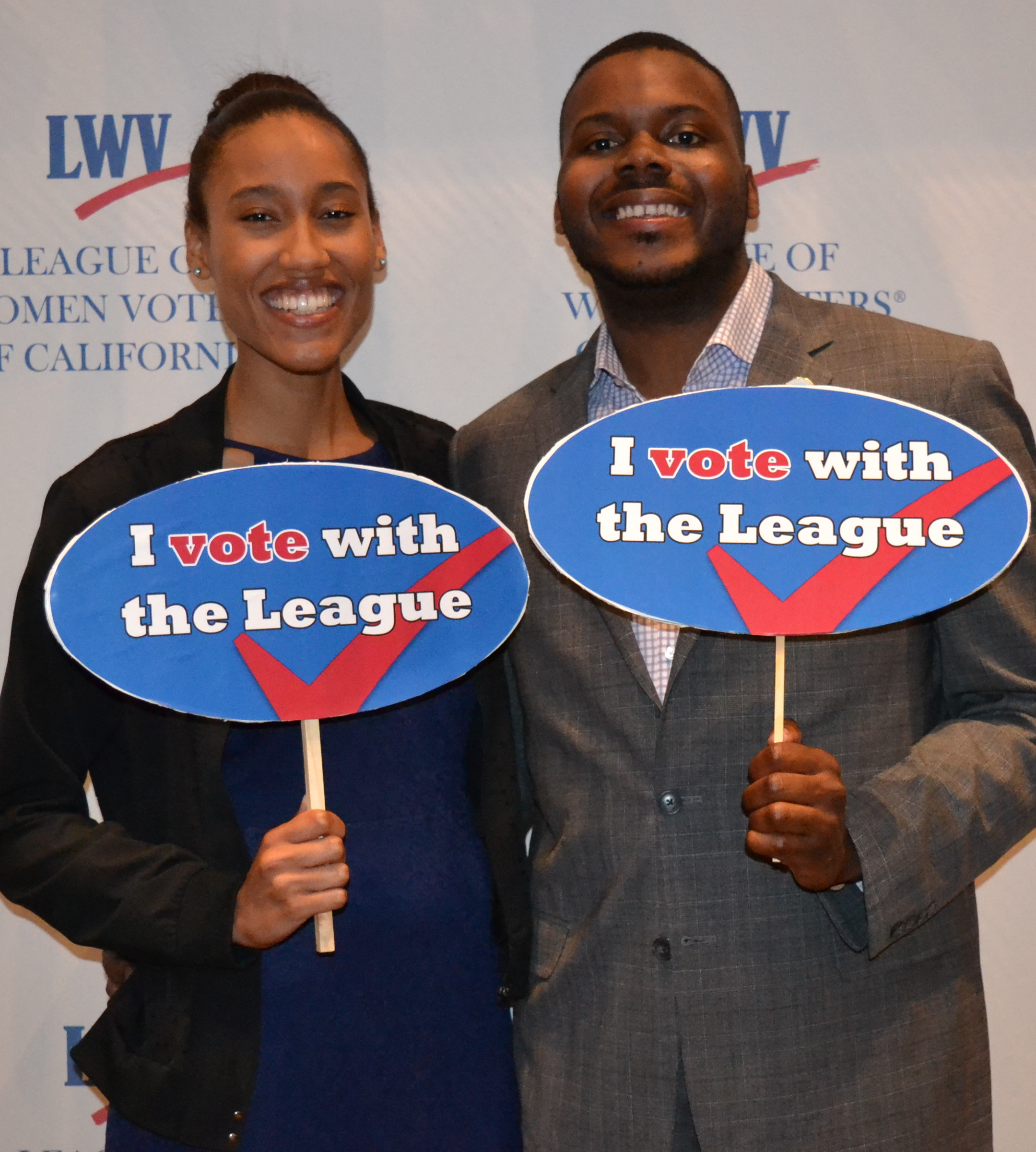 Our Saturday night key note speaker!